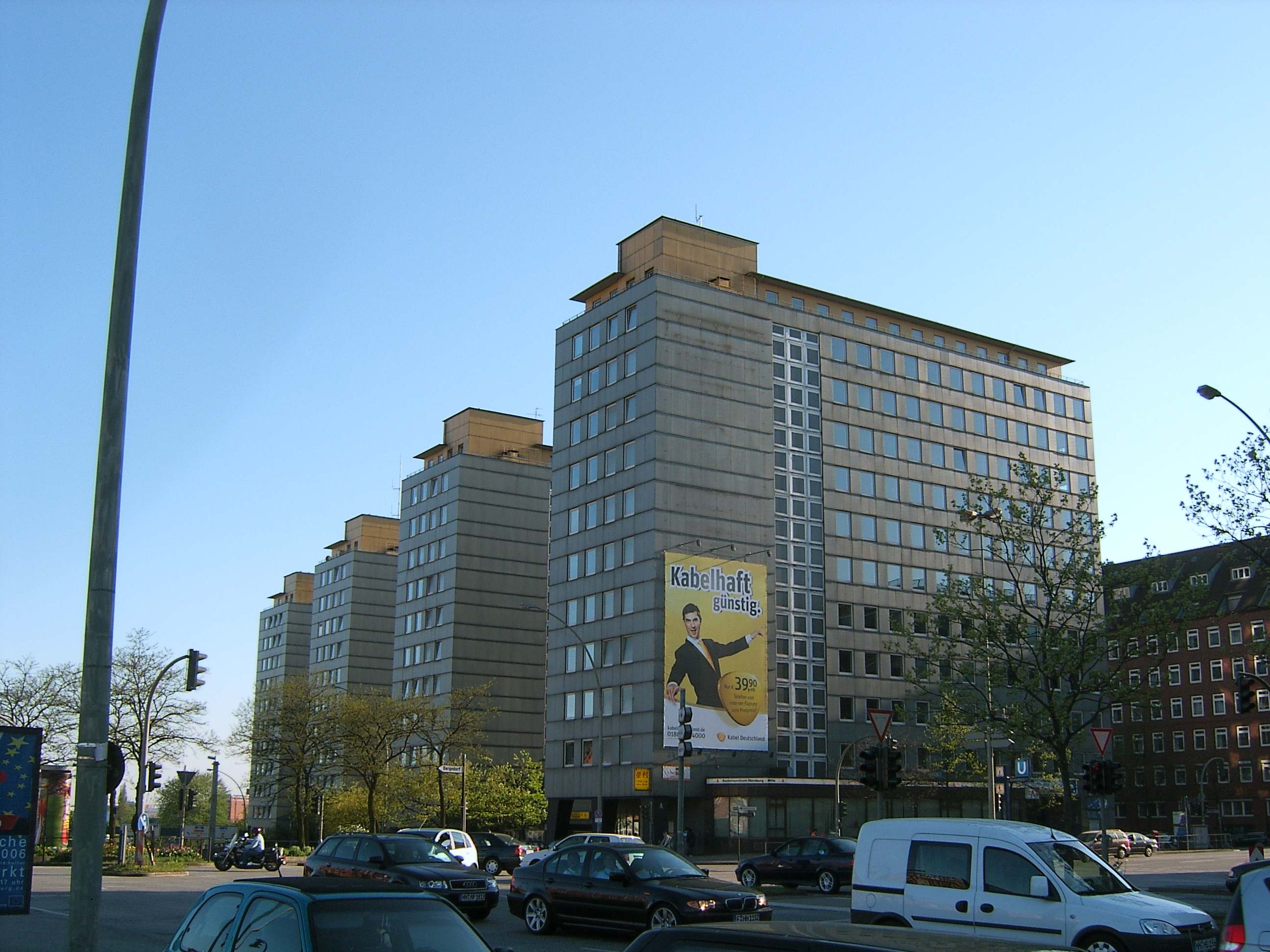 City-Hof in Hamburg-Altstadt. Architekt war Rudolf Klophaus.